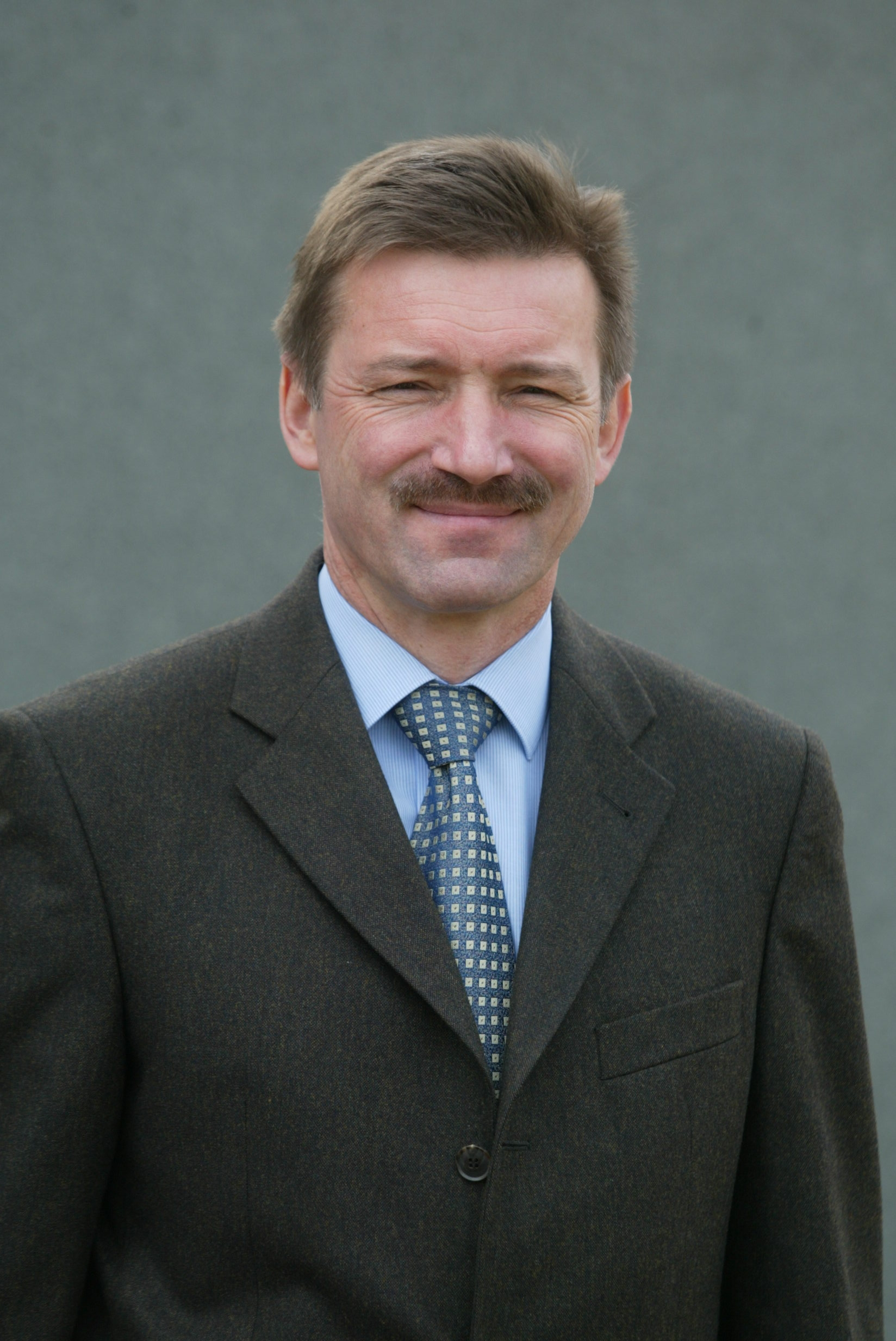 Bogdan Panhirsz - Prezes Grupy PSB